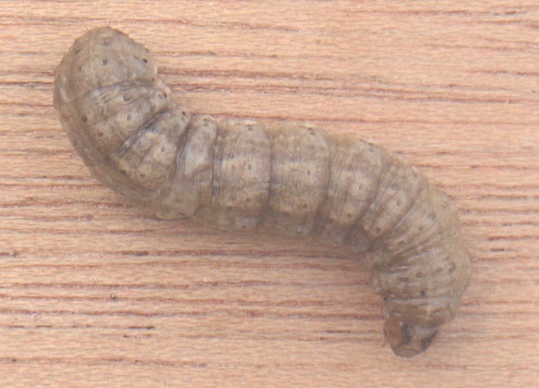 (nl: Aardrups van Grote worteluil) Agrotis ipsilon